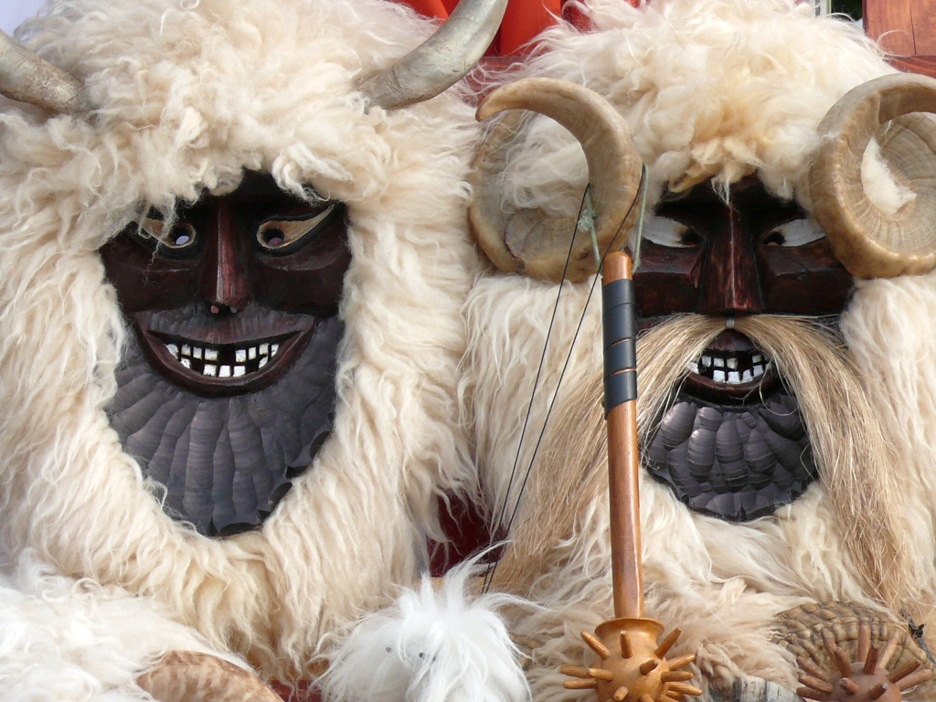 Busó maszkok